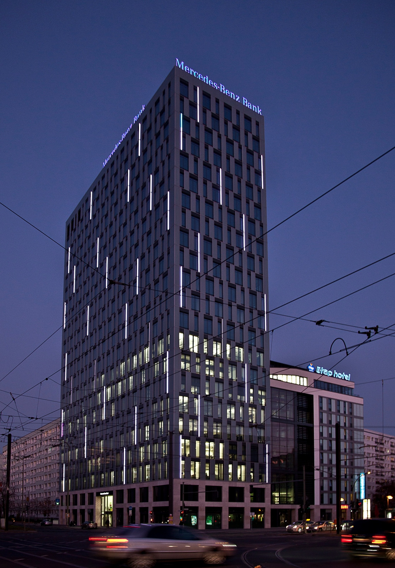 Bürohochhaus im Königstadt Carree am Alexanderplatz in Berlin